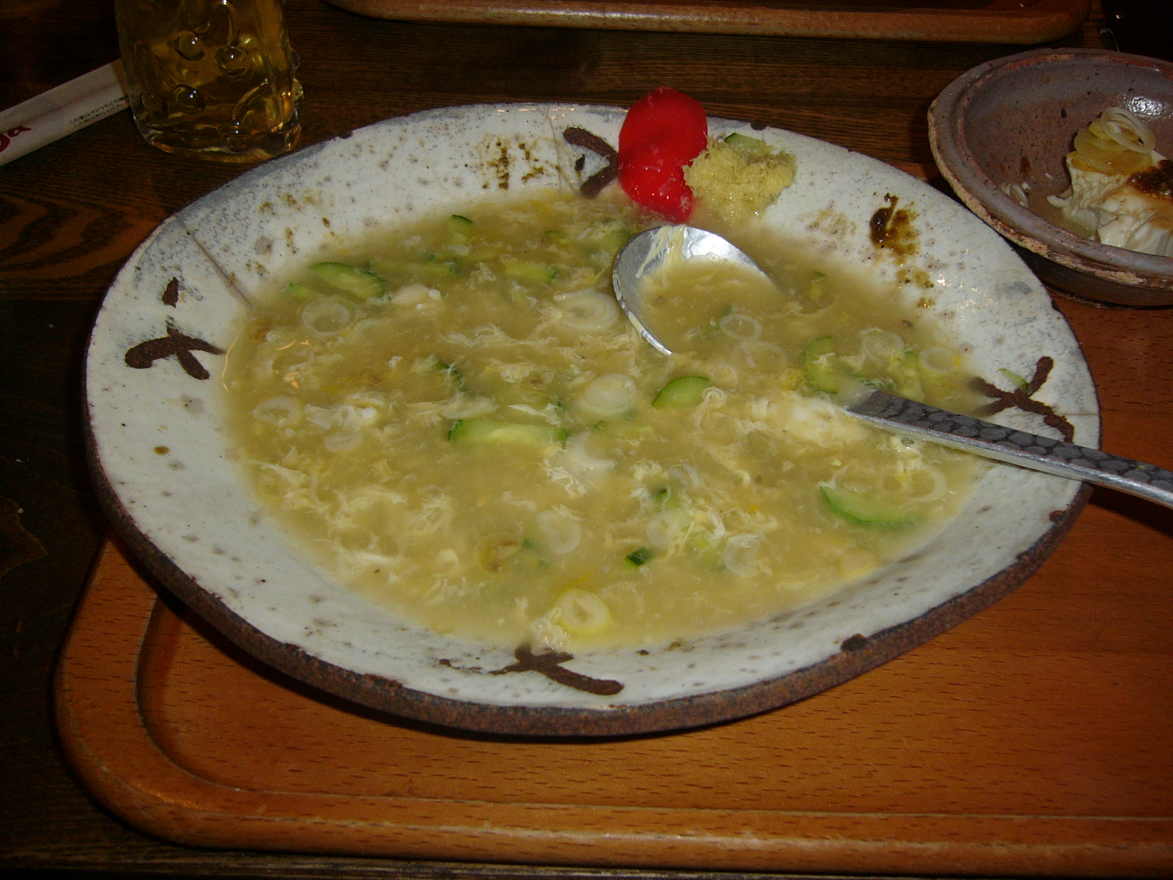 Chi-tan-tan（チータンタン）、盛岡じゃじゃ麺を食べた後につくるもの